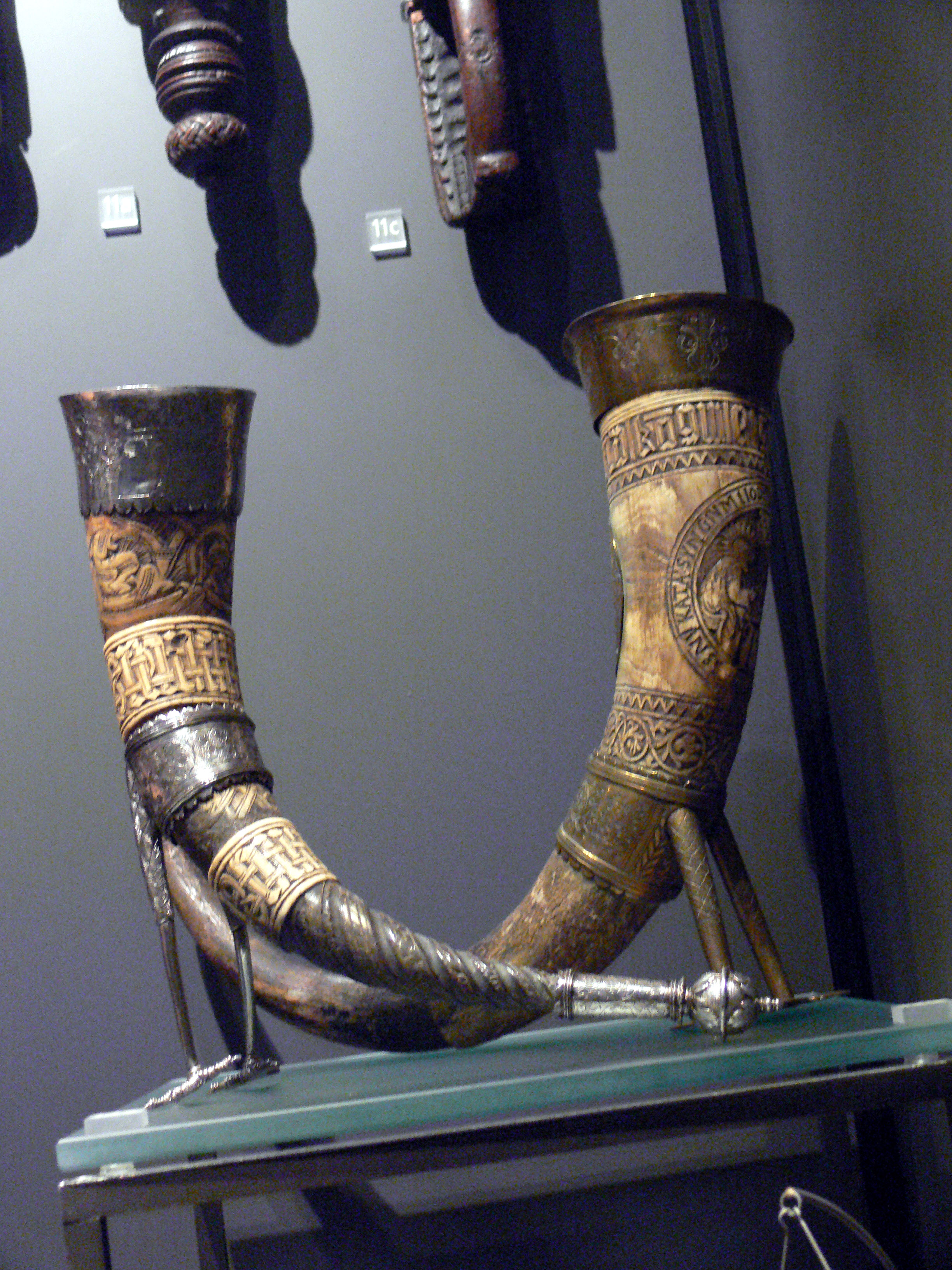 Trinkhörner aus der Zeit um 1600.